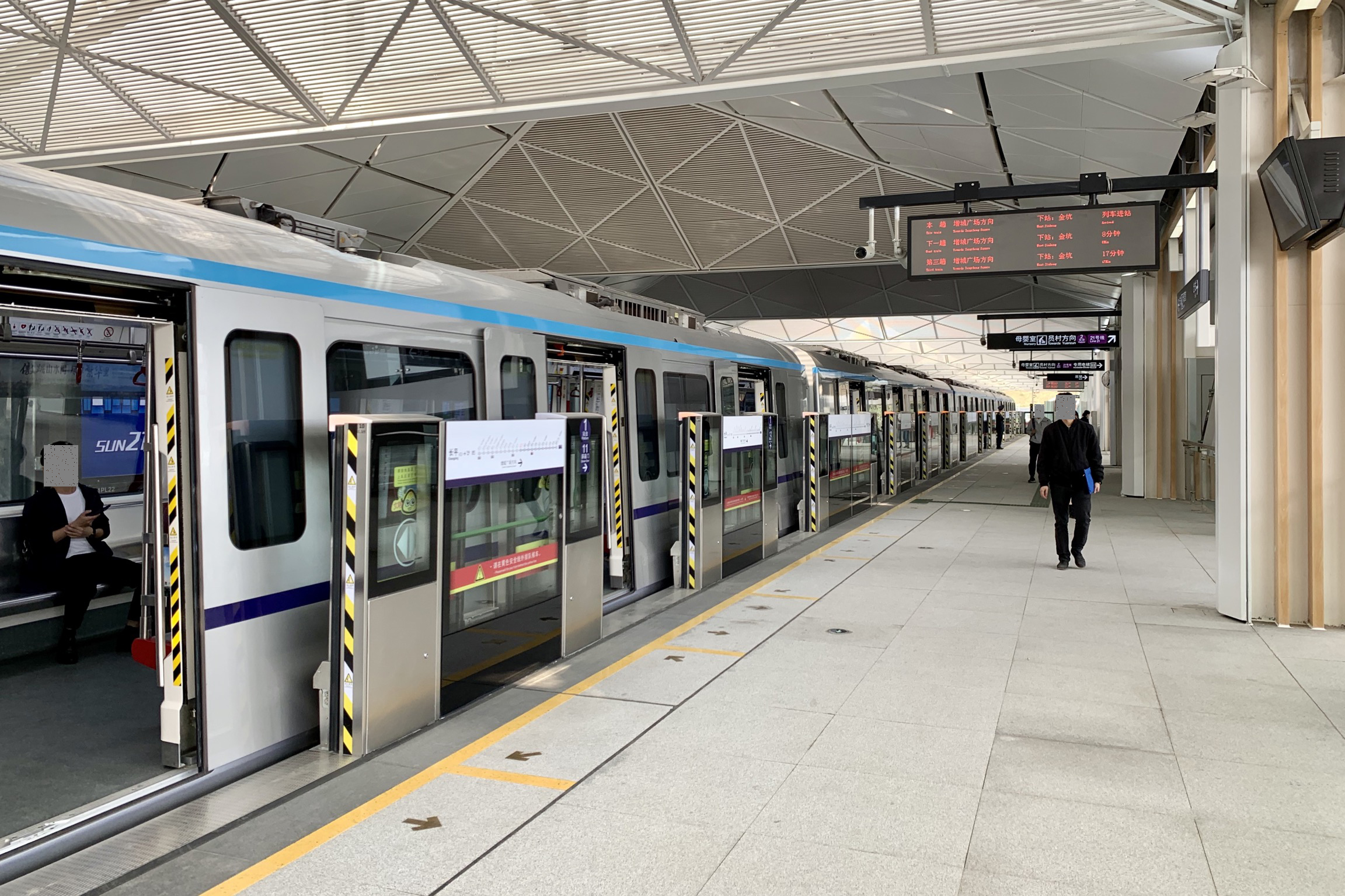 广州地铁长平站1号站台